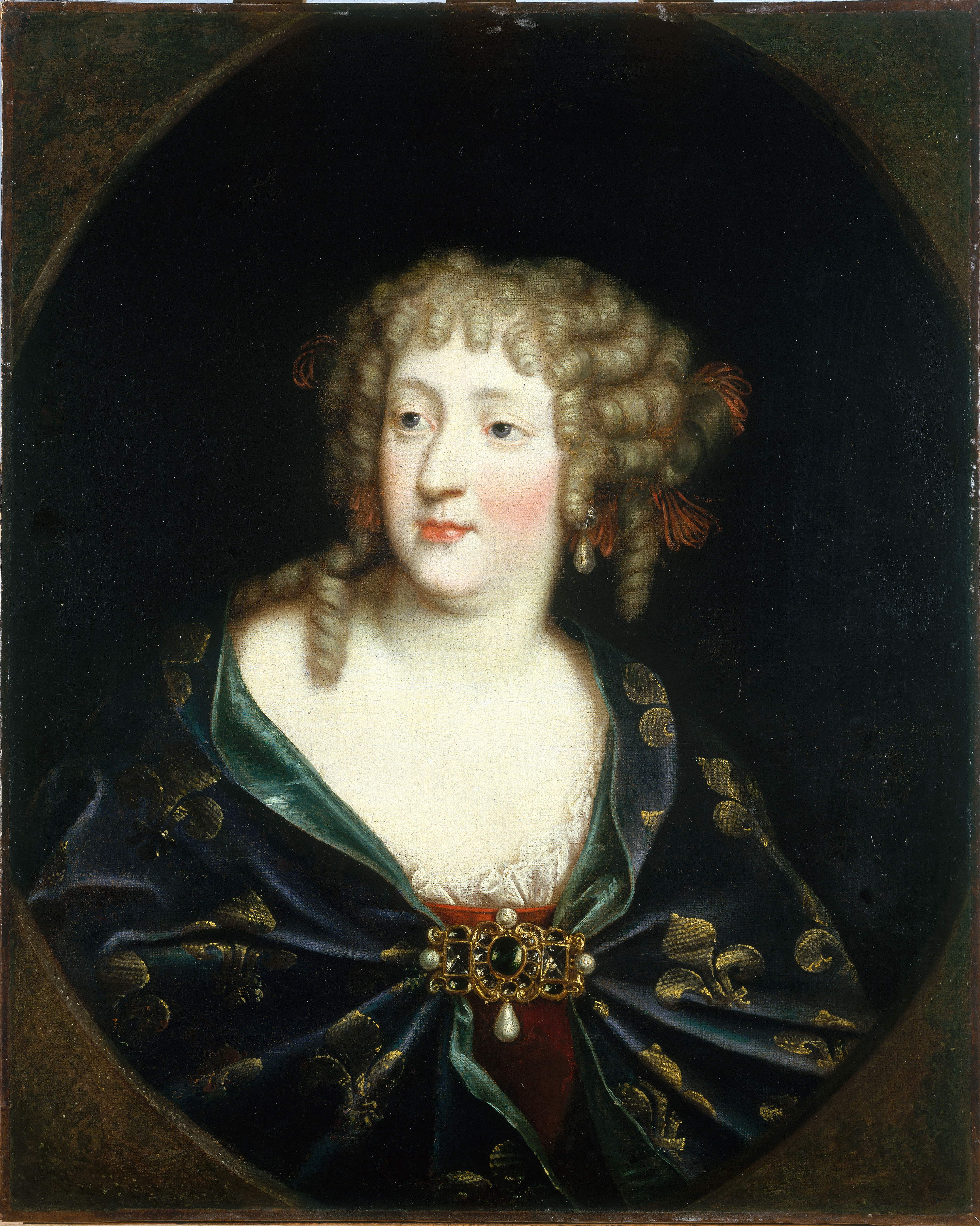 Comme dans plusieurs de ses portraits officiels, la reine est ici représentée dans une robe fleurdelisée, tenue qu’elle ne porta que le jour de son mariage.